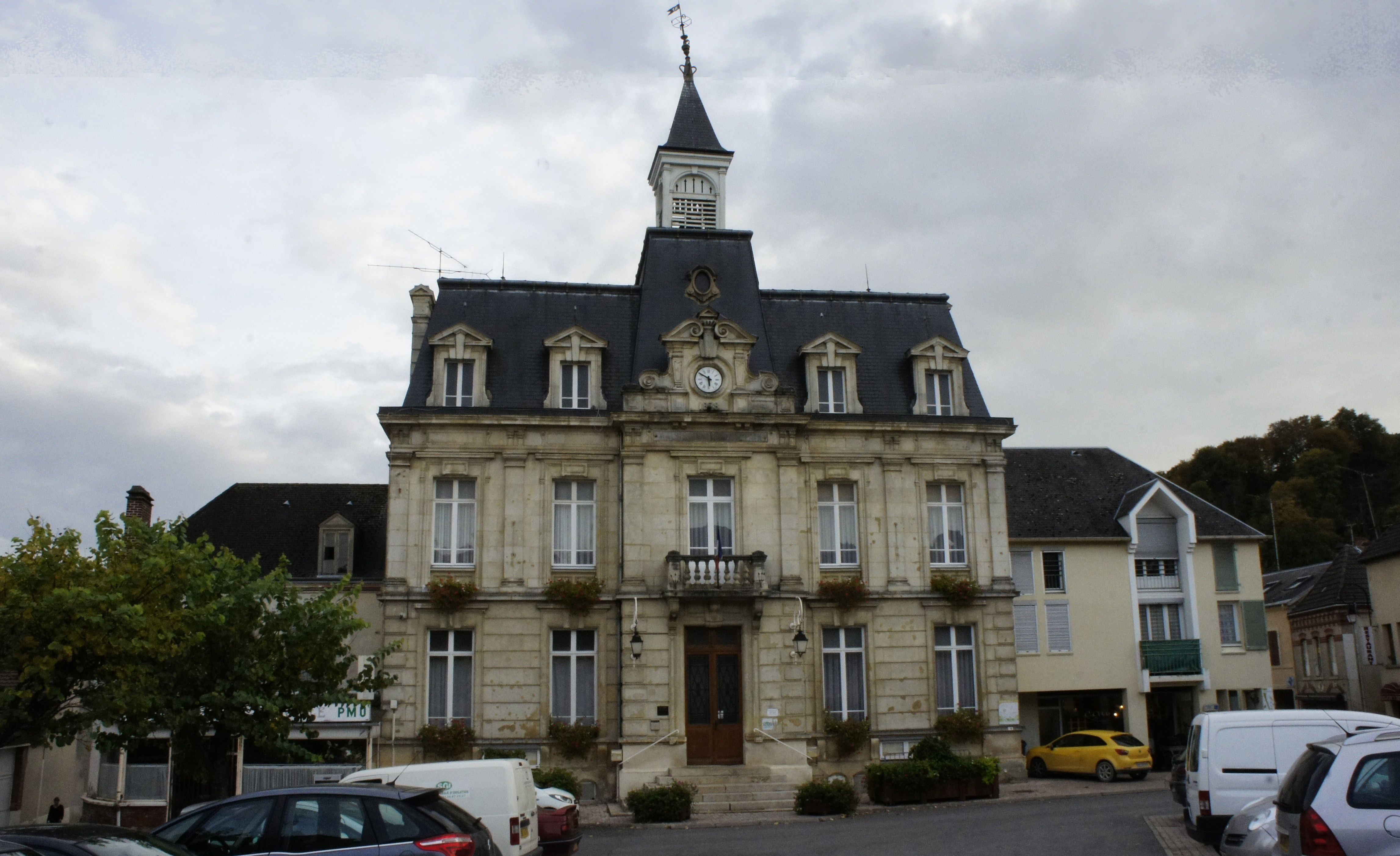 Vue de la place et de la Mairie de Verzy.